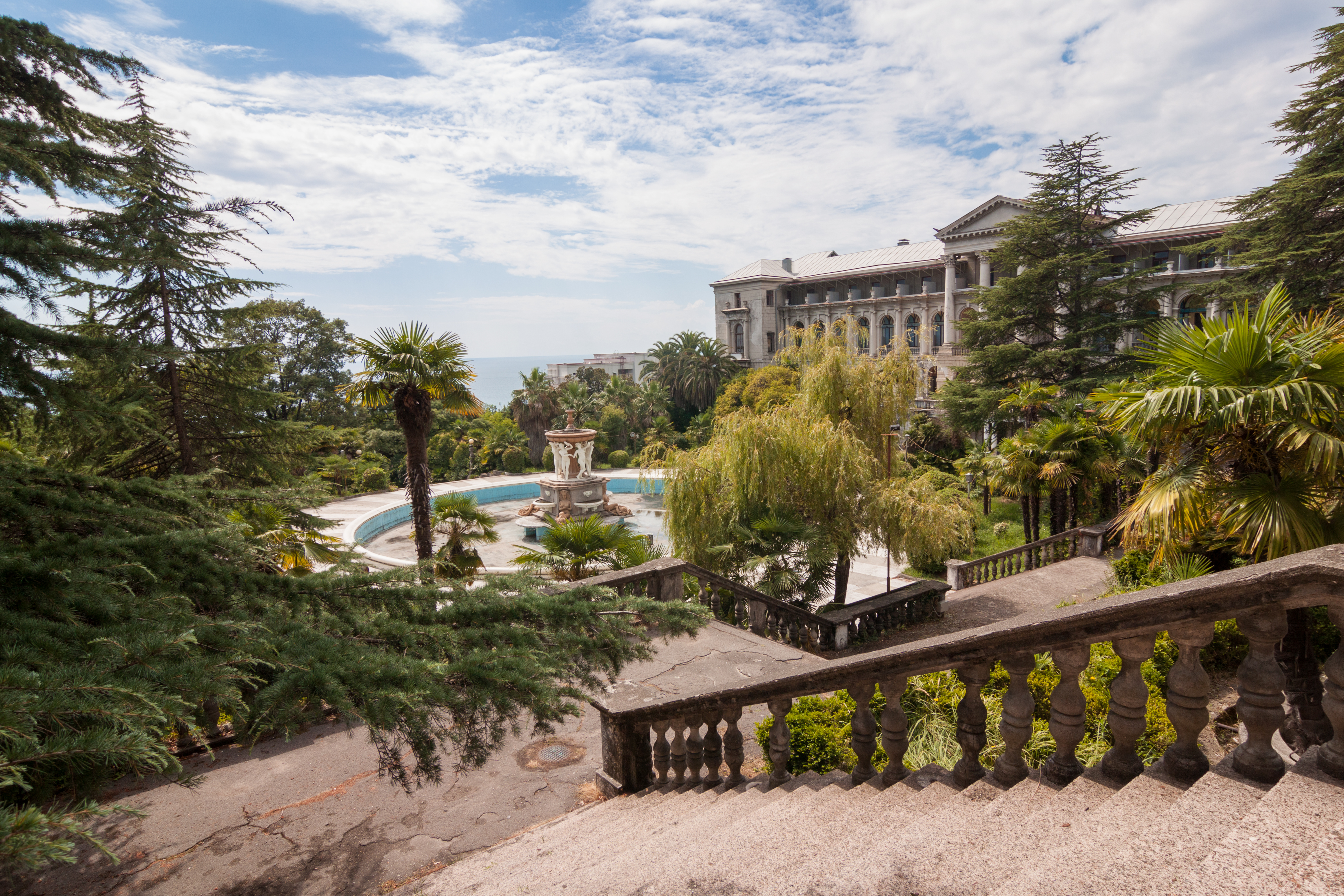 Санаторий им. С. Орджоникидзе: Курортный проспект, 96/5, Хостинский район, Сочи, Краснодарский край